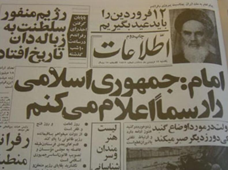 صفحهٔ نخست روزنامهٔ اطلاعات ۱۲ فروردین ۱۳۵۸